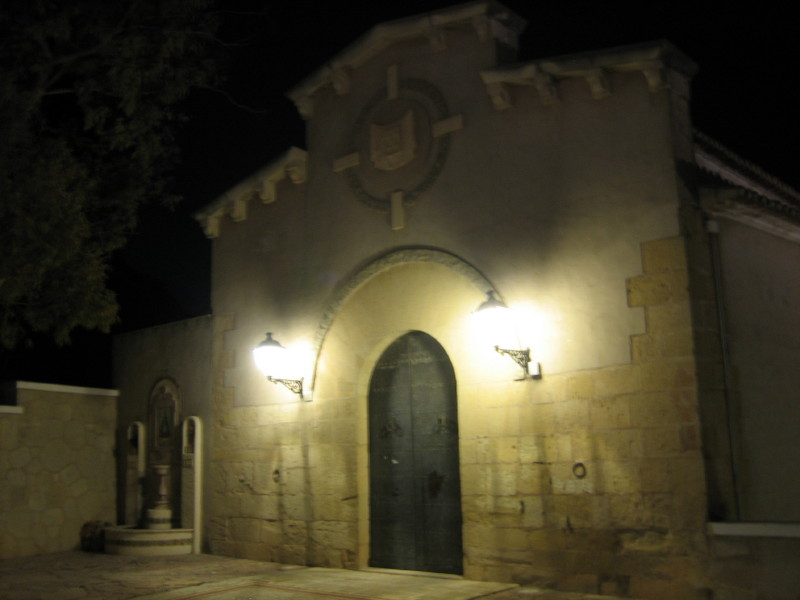 Castalla (Alicante, España): Ermita de la Sangre. Foto realizada por Rodriguillo el 24/02/2005.